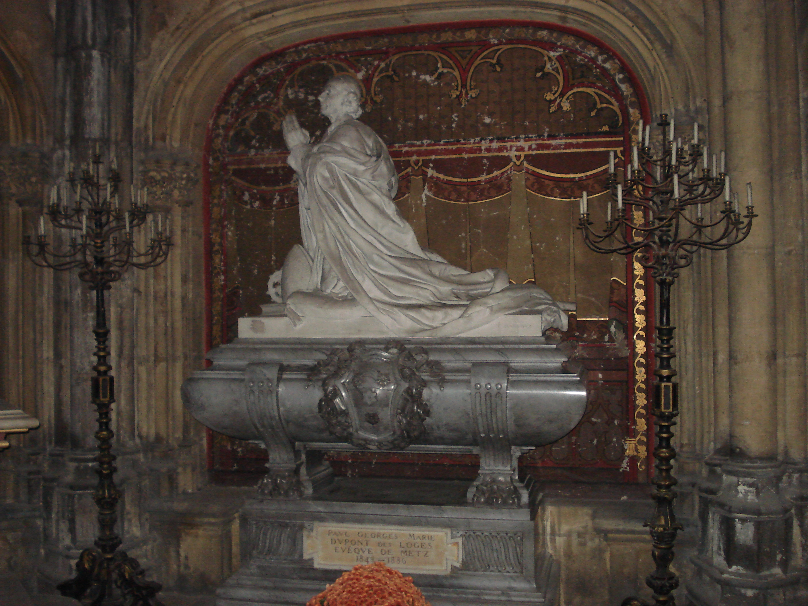 Grab des Paul Dupont des Loges (1804-1886), 99. Bischof von Metz, in der Kathedrale von Metz.